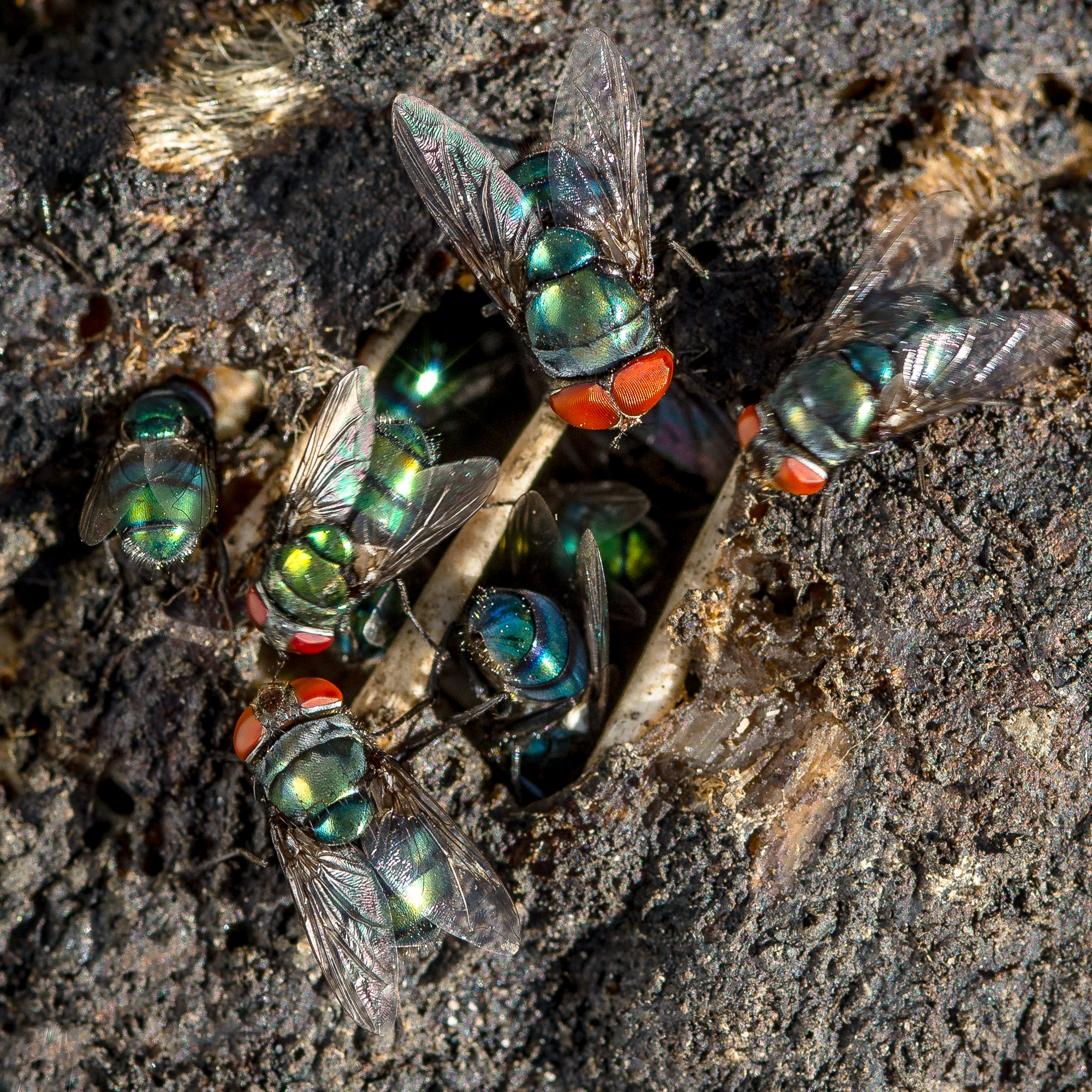 © Bill Waller